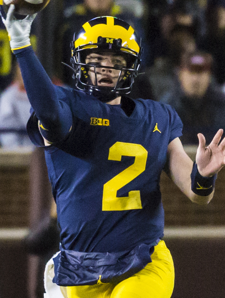 IX8A7972